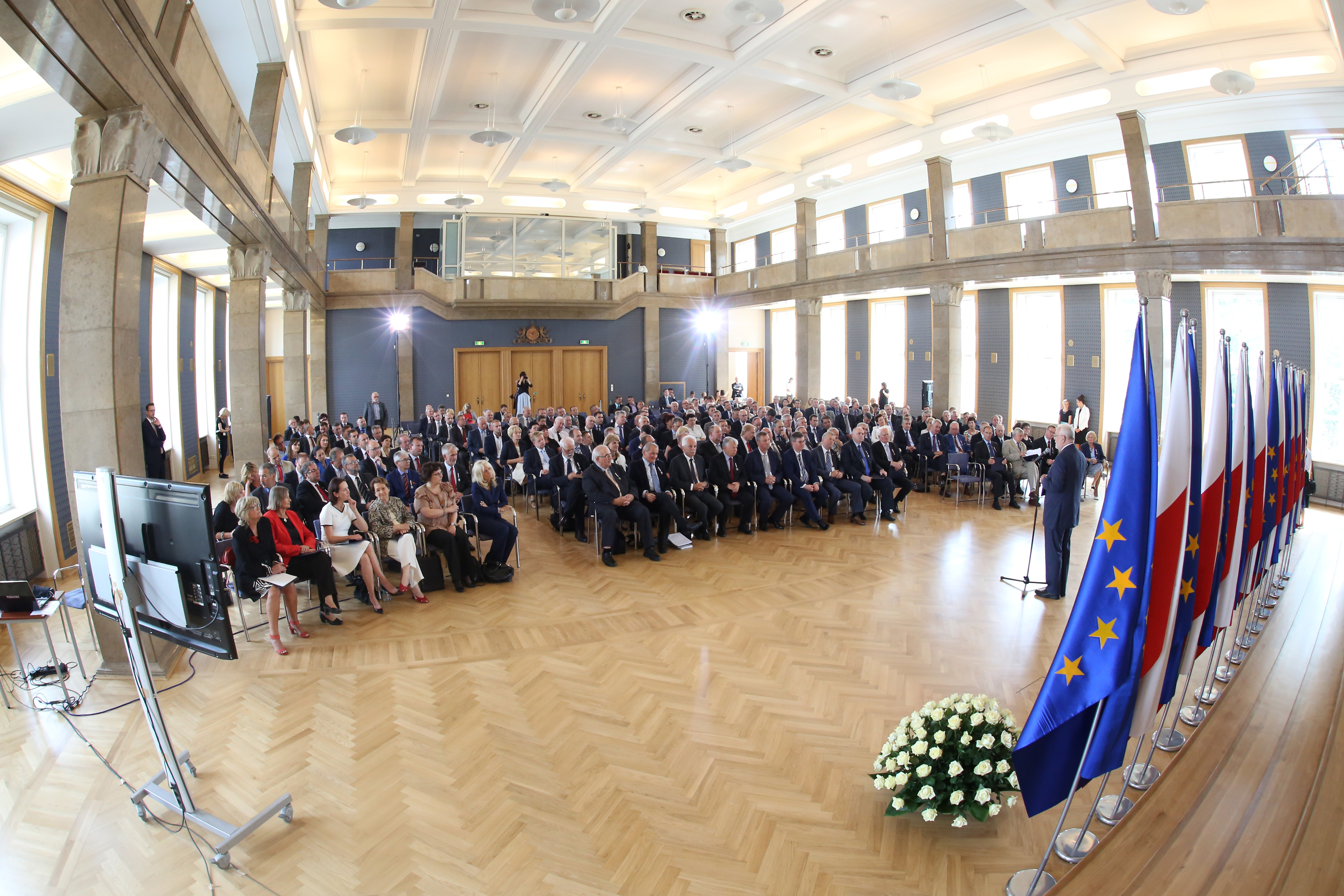 Konferencja „ Od Solidarności do Samorządności” w Sali Kolumnowej Kancelarii Prezesa Rady Ministrów